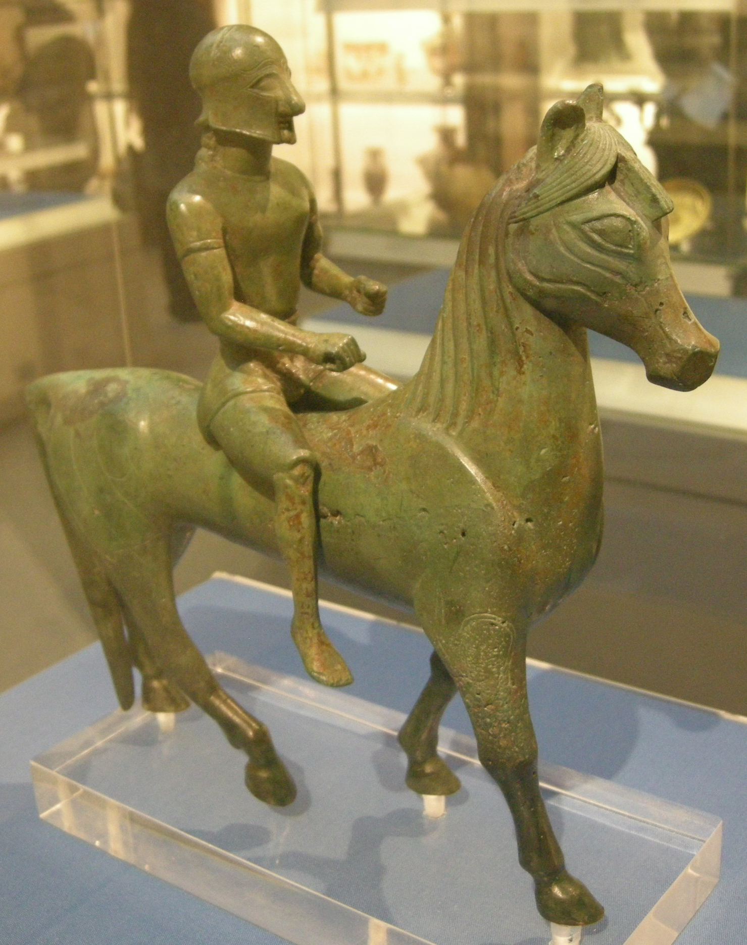 Arte magnogreca di taranto, cavaliere di armento, bronzo, 500 ac. circa